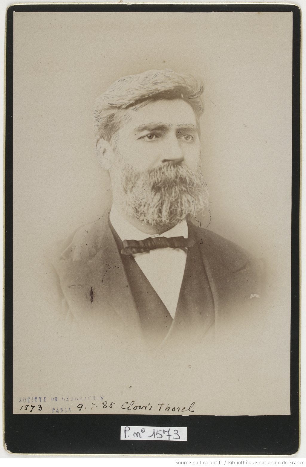 Clovis Thorel, photographie de 1885.